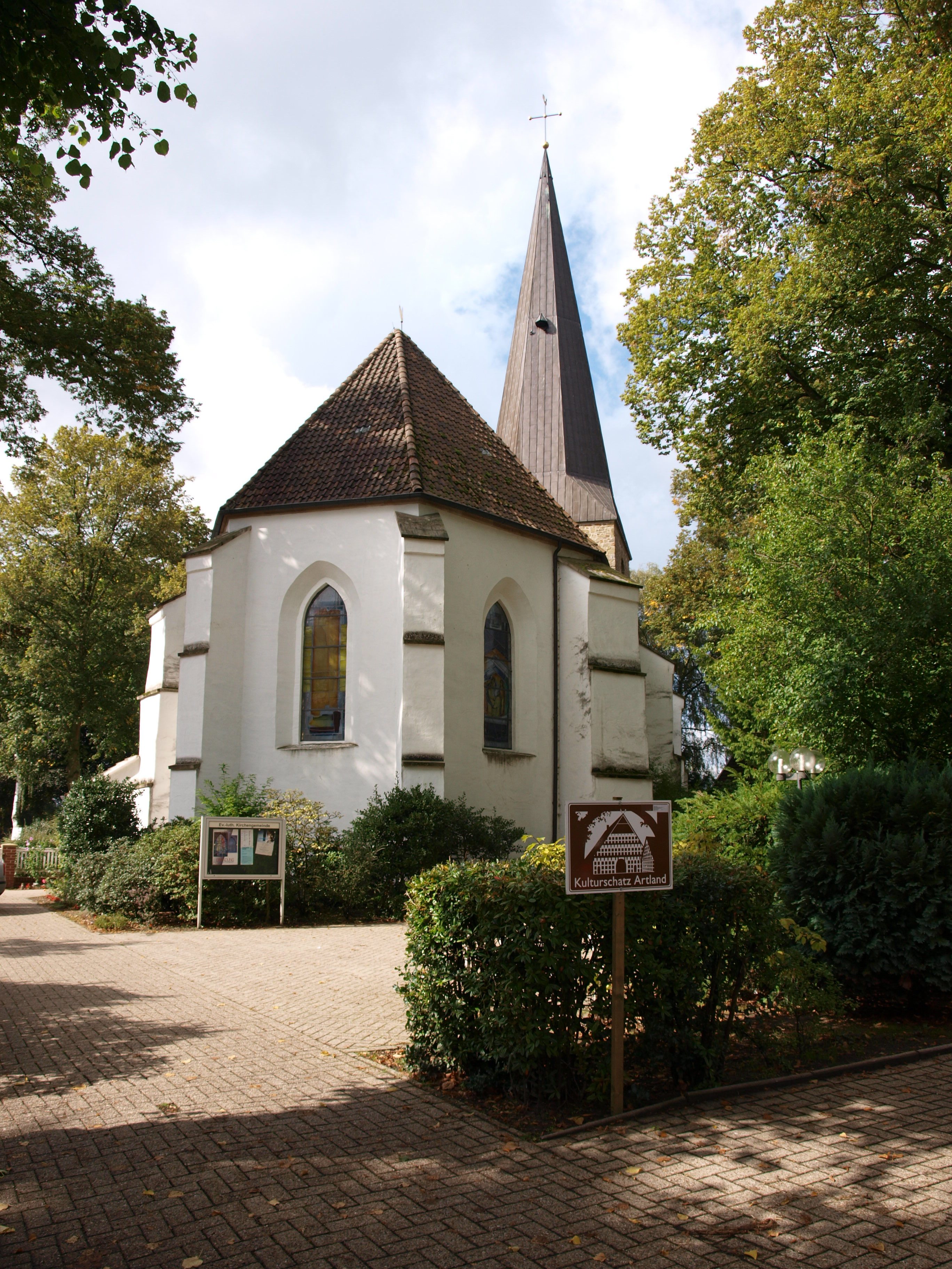 Menslage mit St Marien und Kirchhof